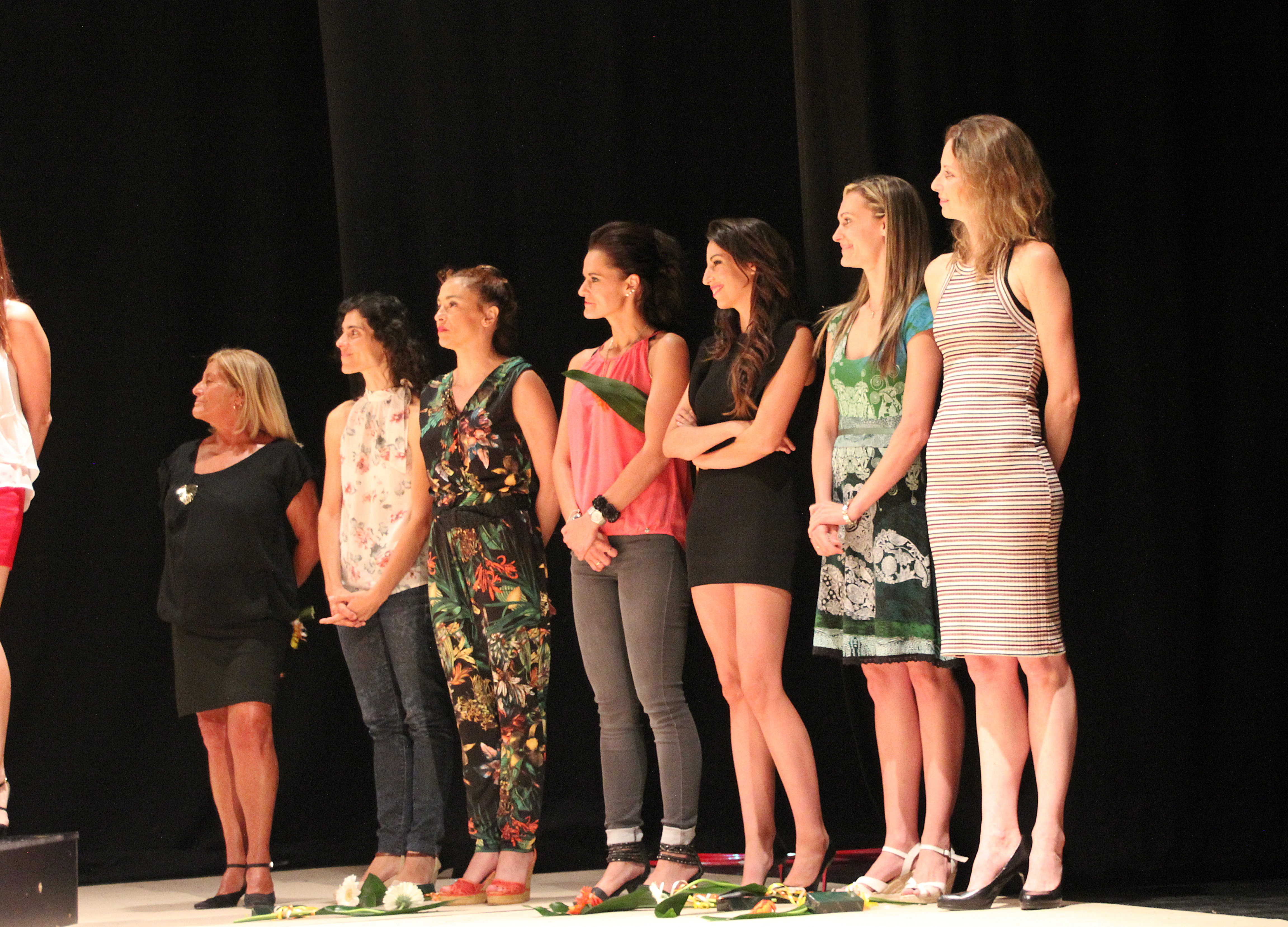 Algunas de las invitadas a la Gala 20º Aniversario de la Medalla de Oro de Atlanta '96 en Badajoz (2016). De izquierda a derecha: María Eugenia Rodríguez, Ana Bautista, Carolina Pascual, Alba Caride, Almudena Cid, Marta Calamonte y Carolina Malchair.